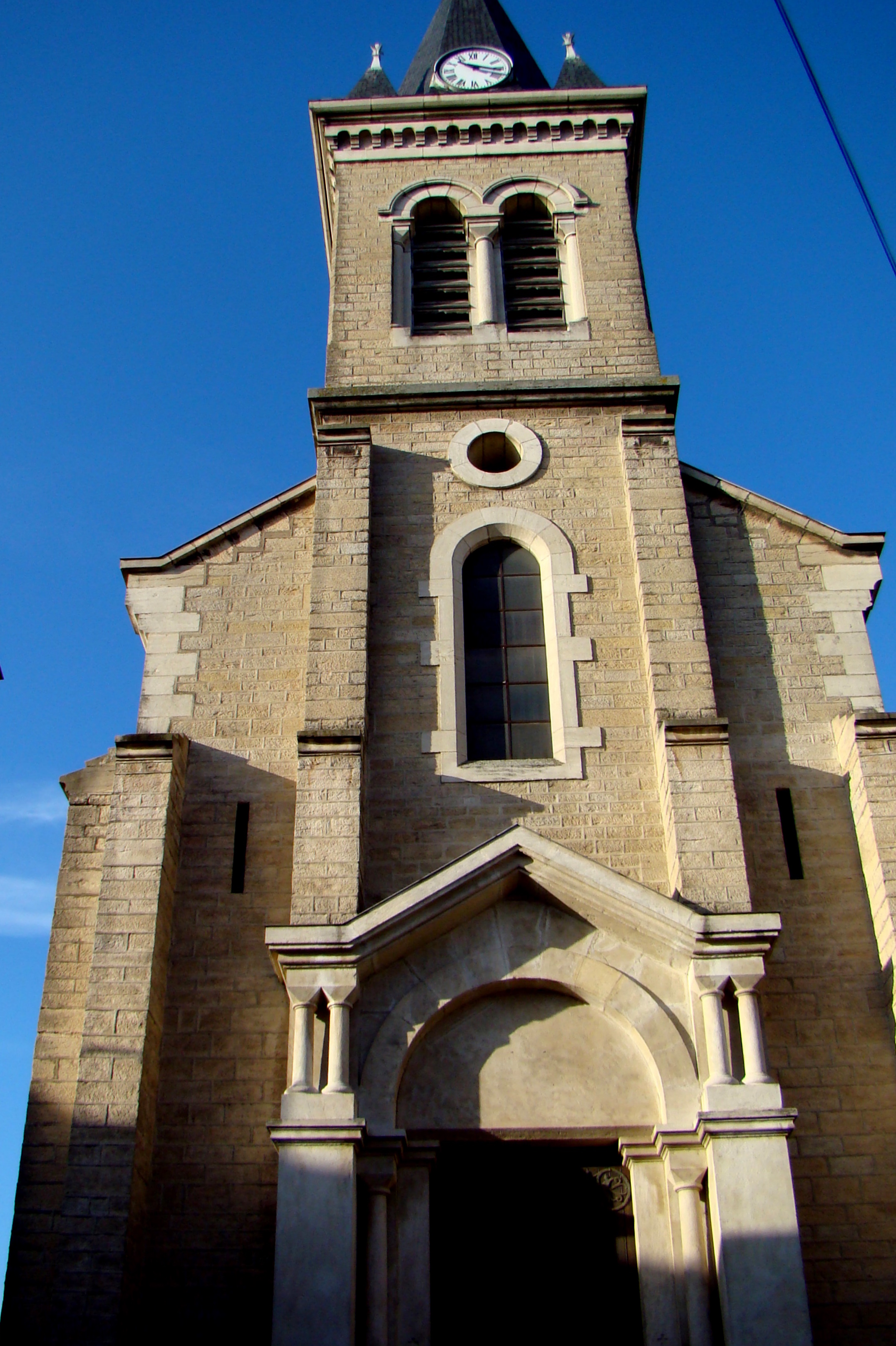 L'église